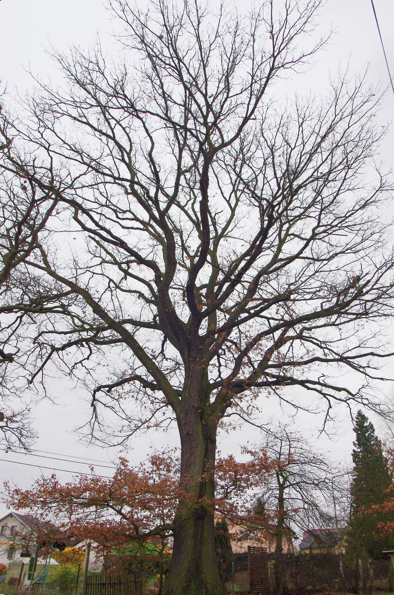 památný strom - Dub u Vorlů - Jenišov, okres Karlovy Vary